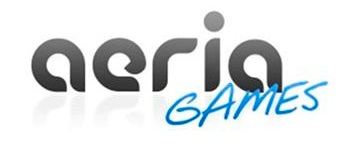 Diese Logo gehört Aeria Games and Entertainment, Inc. for Aeria Games and Entertainment. Es ist ein historisches Logo. Es ist historisch, da Aeria games das Logo kontinuierlich verändert, um einen neuen Stil auszudrücken. Das ist das aktuelle Website Logo.